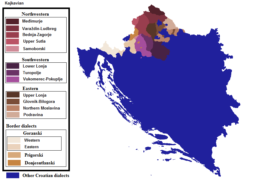 Kajkavski dijalekti, podijeljeni na poddijalekte po Lončariću